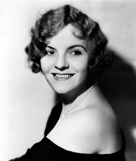 Winnie Lightner, foto pubblicitaria